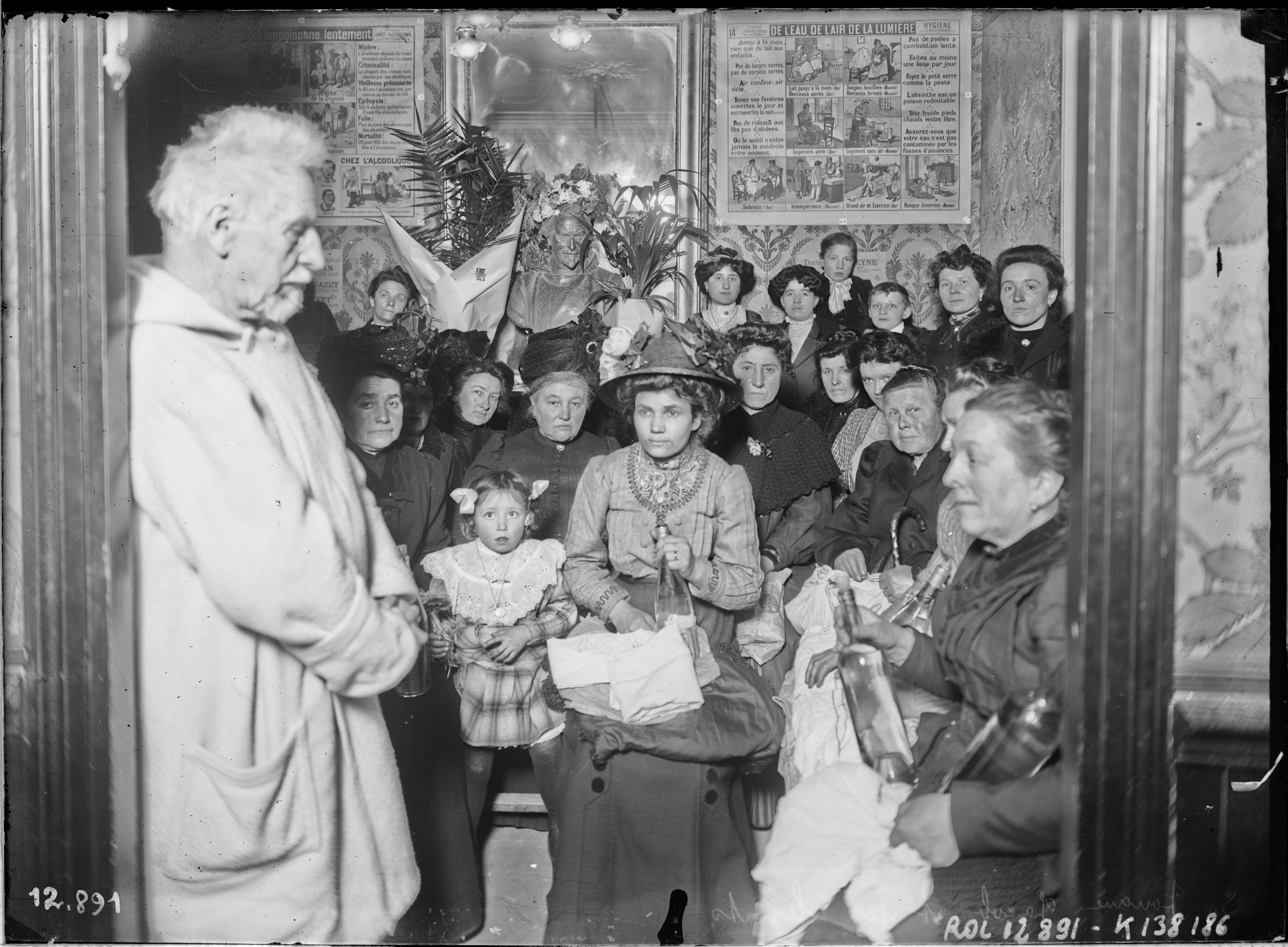 Photographie de presse